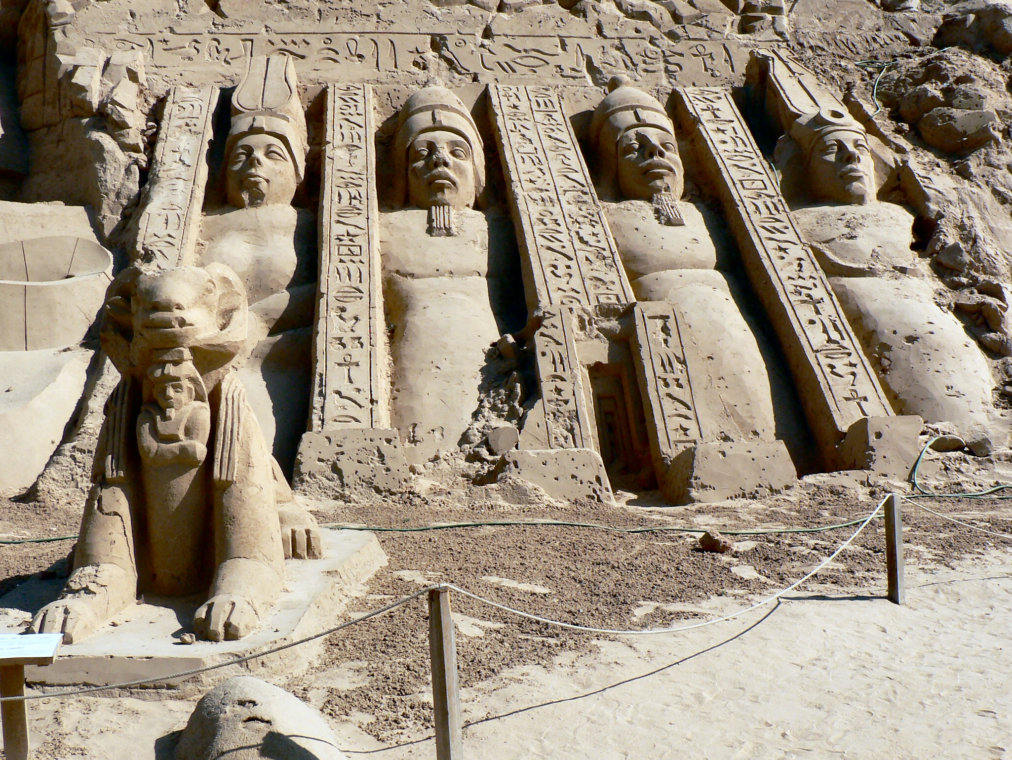 Escultura em areia Templo de Abu Simbel temple sand sculpture in Pera, Algarve - FIESA 2007